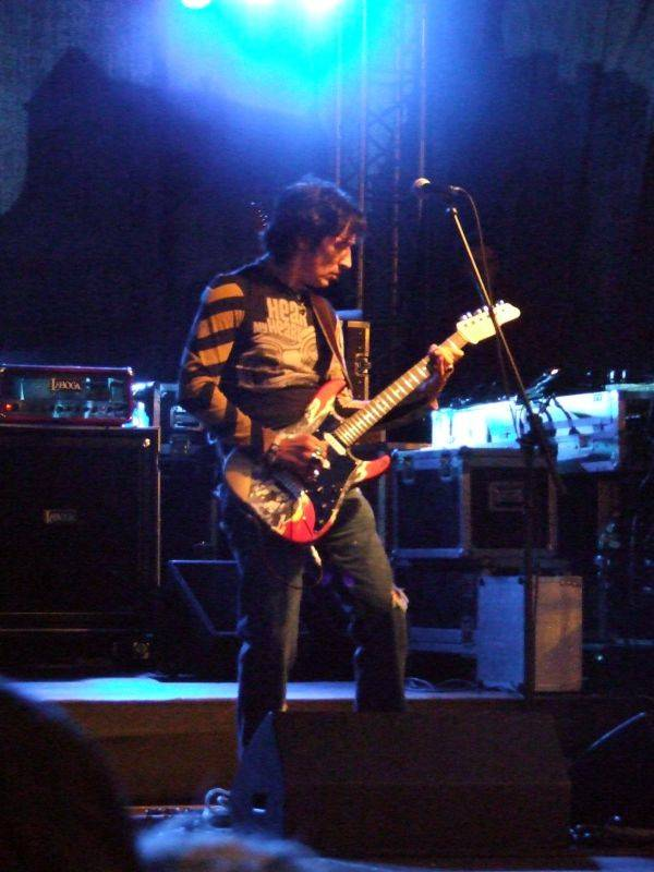 Jan Borysewicz